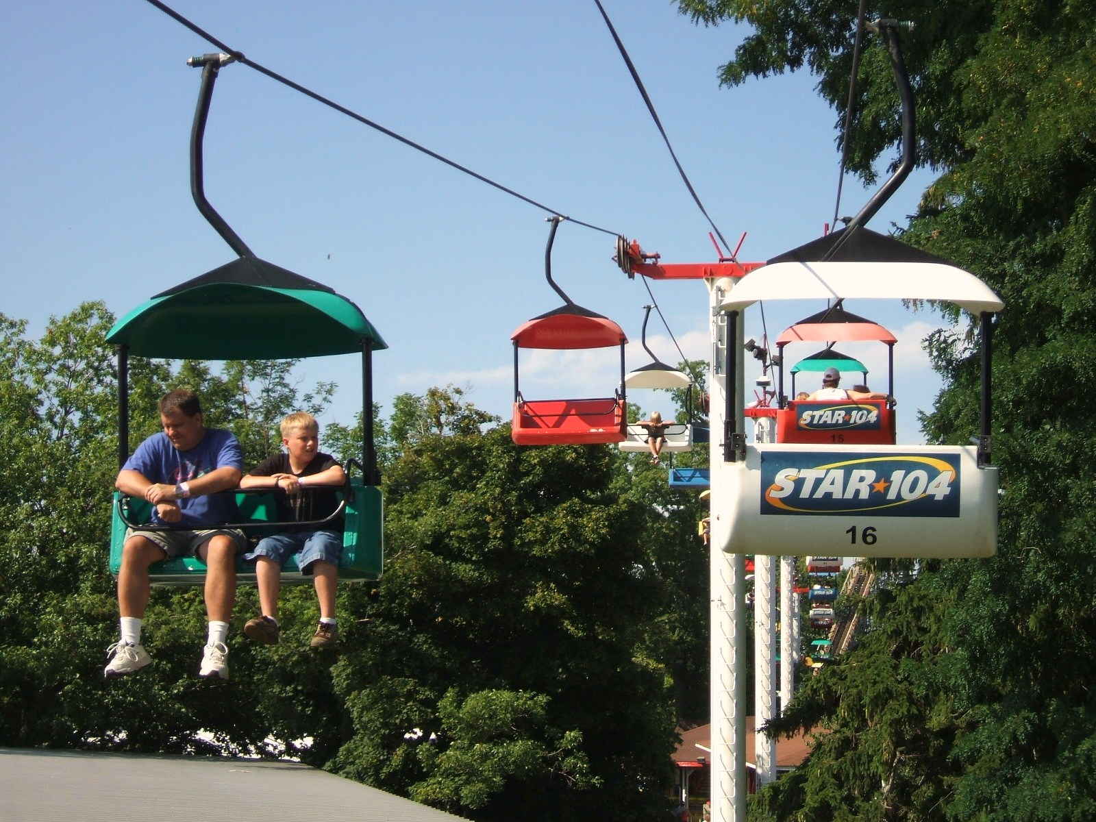 Sky Ride